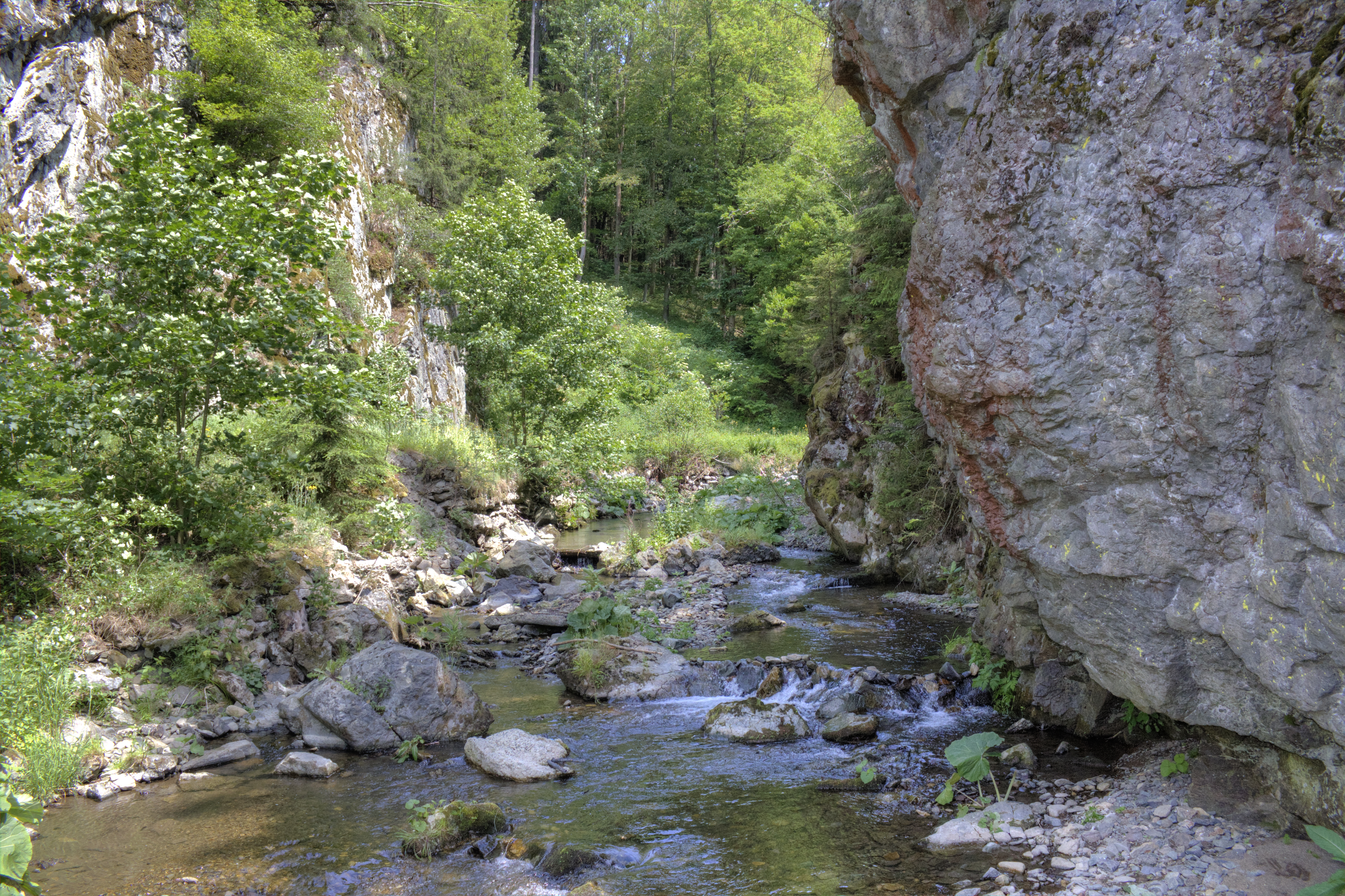 Blick in die Steinachklamm